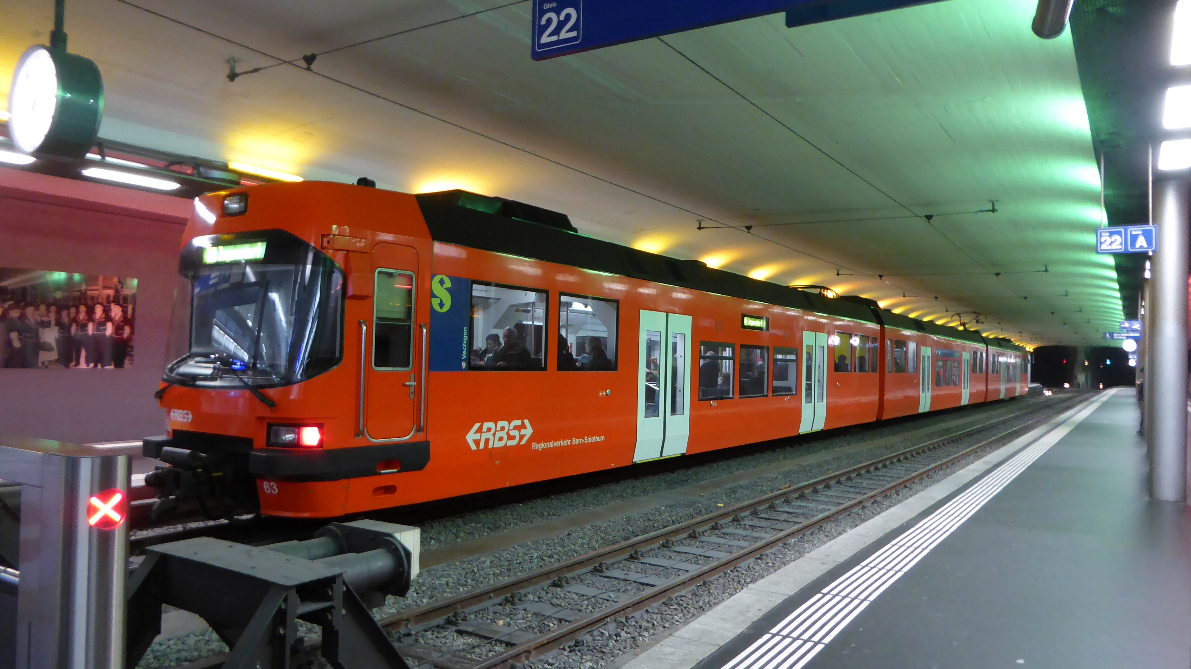 ABe 4/12 63 des Regionalverkehrs Bern–Solothurn im Bahnhof Bern RBS